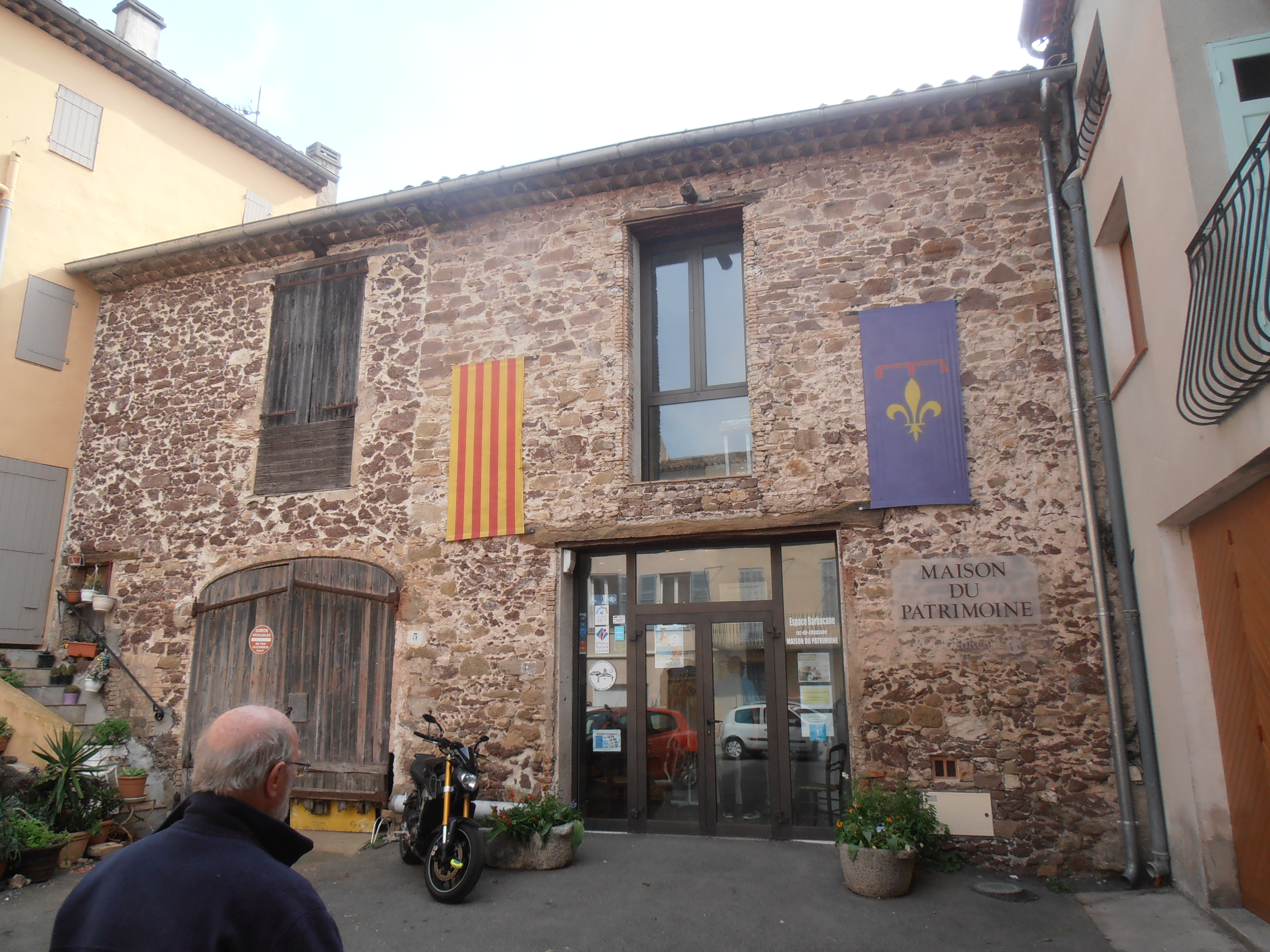 Var, Roquebrune-sur-Argens, Maison du patrimoine : Dans l'ancien garage municipal, une glacière du 17ème siècle a été découverte en 2002 puis fouillée par le Comité pour la Protection des Sites et Monuments Historiques. Le site a alors été réhabilité en mettant en valeur la glacière tout en créant en 2004 la Maison du patrimoine qui retrace l'histoire du terroir de Roquebrune de l'époque Paléolithique à nos jours. Elle présente aussi des vestiges archéologiques provenant des grottes de la Bouverie, des décors, objets, outils provençaux traditionnels ainsi qu'une collection d'ex-voto.